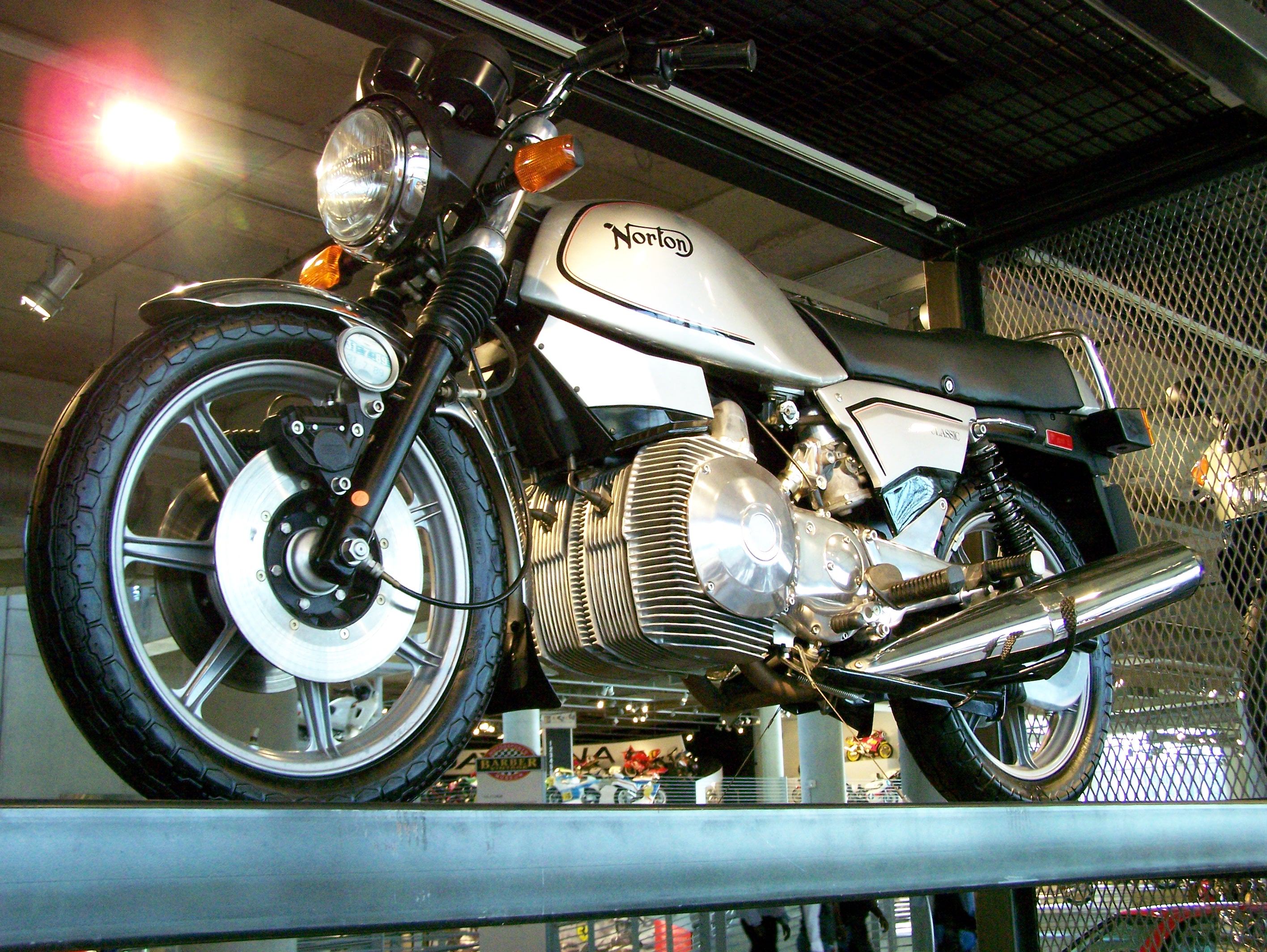 Barber Vintage Museum_439 Norton Classic